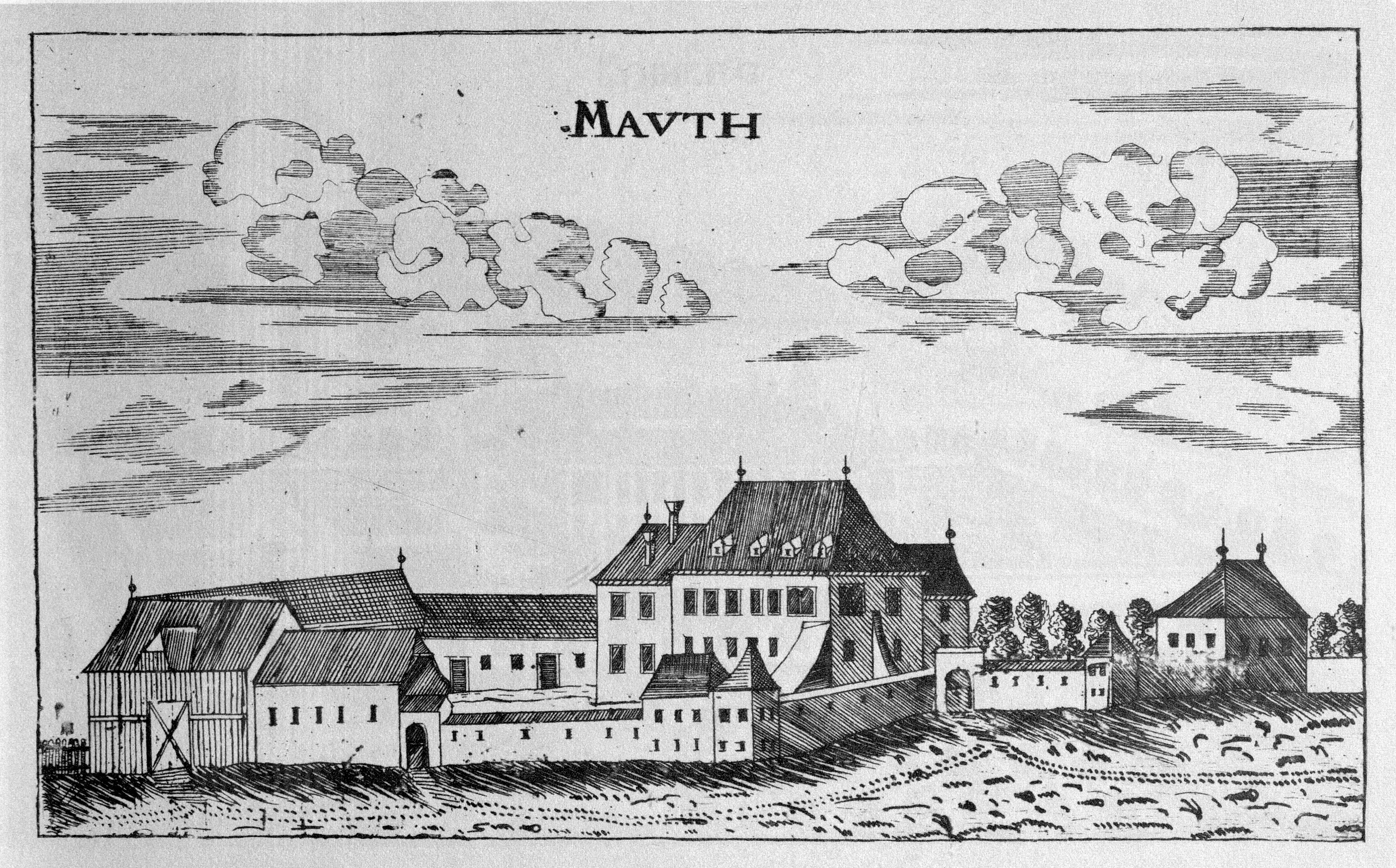 G. M. Vischers Käyserlichen Geographi, Topographia Ducatus Stiriae, Das ist: Eigentliche Delineation / und Abbildung aller Städte / Schlösser / Marcktfleck / Lustgärten / Probsteyen / Stiffter / Clöster und Kirchen / so es sich im Herzogthumb Steyrmarck befinden; Und anjetzo Umb einen billichen Preyß zu finden seynd Bey Johann Bitsch Universitäts Buchhandlern / Auff dem Juden=Platz bey der guldenen Saulen. Graz 1681 Die Nummerierung der Dateien folgt der alphabetischen Reihung der Ortsnamen Anmerkung: Dies ist Schloss Kienhofen in Hohenmauten (Heute Graščina Kienhofen in Muta) (heute Rathaus), nicht die Burgruine Hohenmauten.